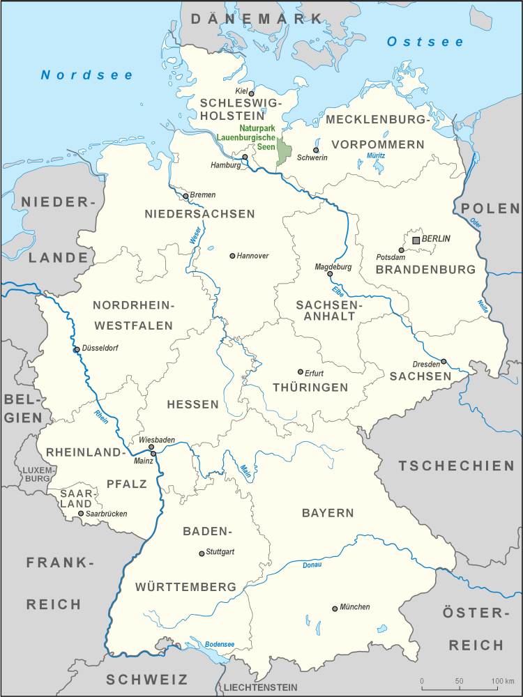 Karte des Naturparks Lauenburgische Seen in Deutschland